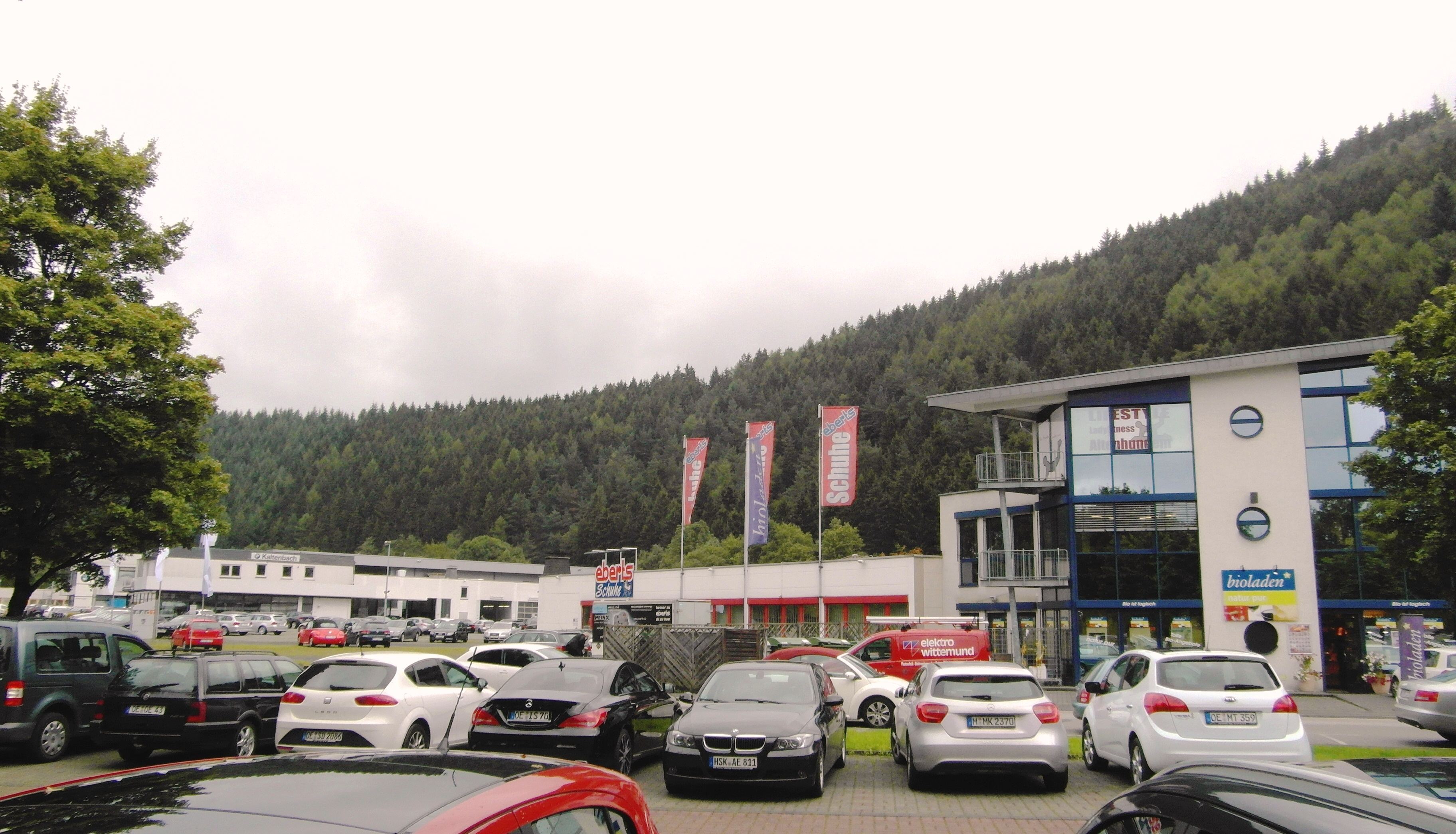 Gewerbegebiet Wigey mit Arzt- und Bürohaus, Handelsbetrieben u.a.